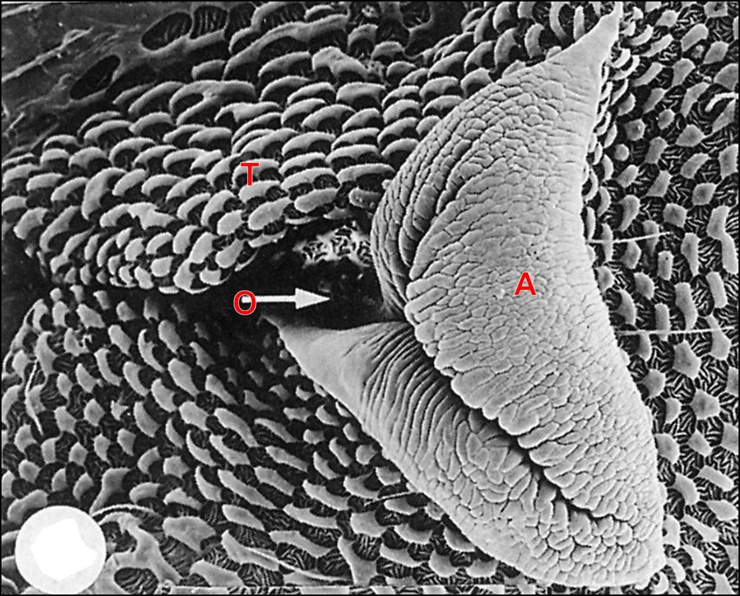 Orifice d'une glande odorante et son auricule sur le métathorax d' Arachnocoris varius. Microscopie électronique à balayage.